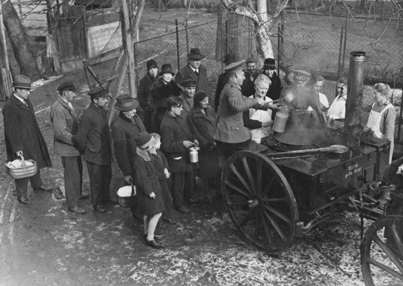 berlin, Armenspeisung ADN-ZB/Archiv Deutschland Berlin: Wohltätigkeitsspeisung armer Leute durch die evangelische Kirchengemeinde In Berlin Niederschönhausen werden durch die evangelische Kirchengemeinde arme Leute gespeist. Die Reichswehr hat eine Goulaschkanone und 2 Mann zur Verfügung gestellt. Die Kosten der Speisung bringt die Kirchengemeinde durch freiwillige Spenden auf. Jedes Mitglied zahlt pro Tag 10 Pfennige vorläufig für die Dauer von 3 Monaten. (Aufnahme: 1931) 5417-31